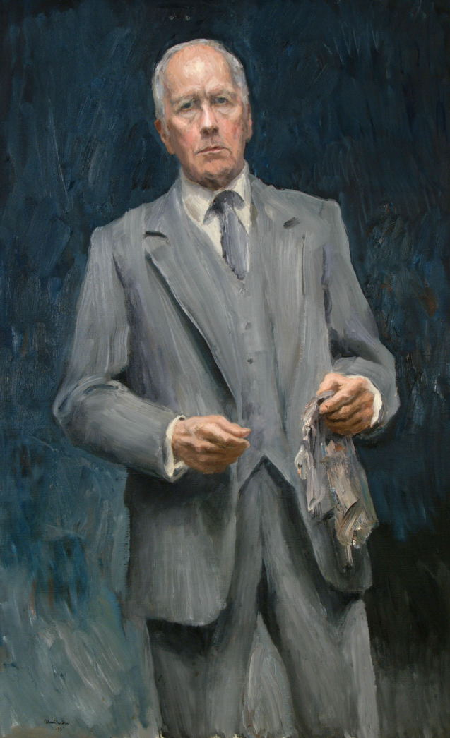 Self portrait by Bertram Schmiterlöw